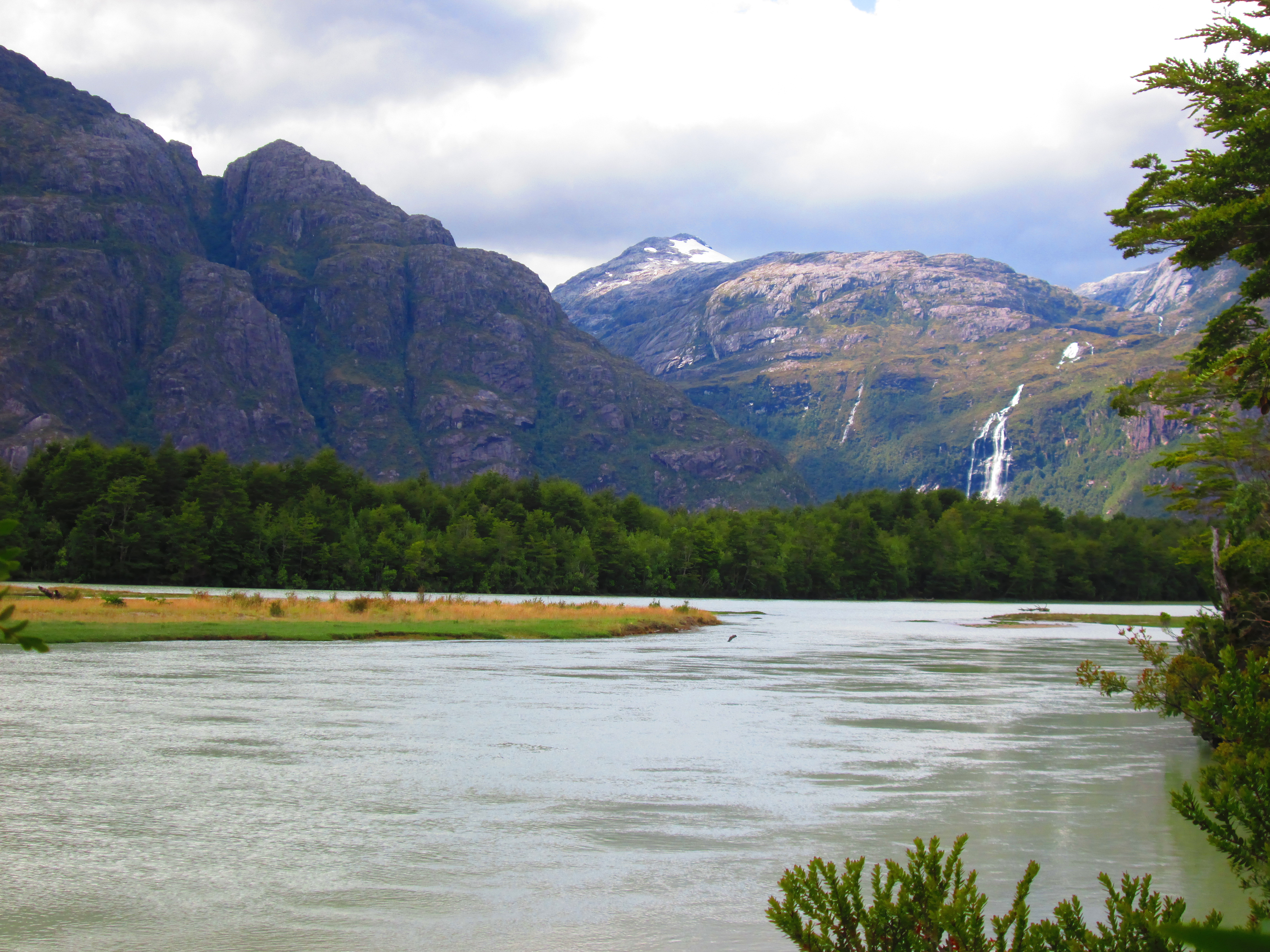 Vista del río Baker en la zona trasera a Caleta Tortel, región de Aysén.